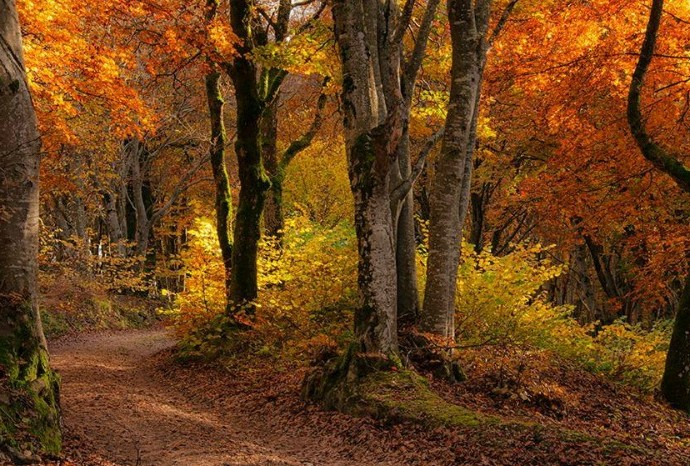 Bosco di faggio in una collina